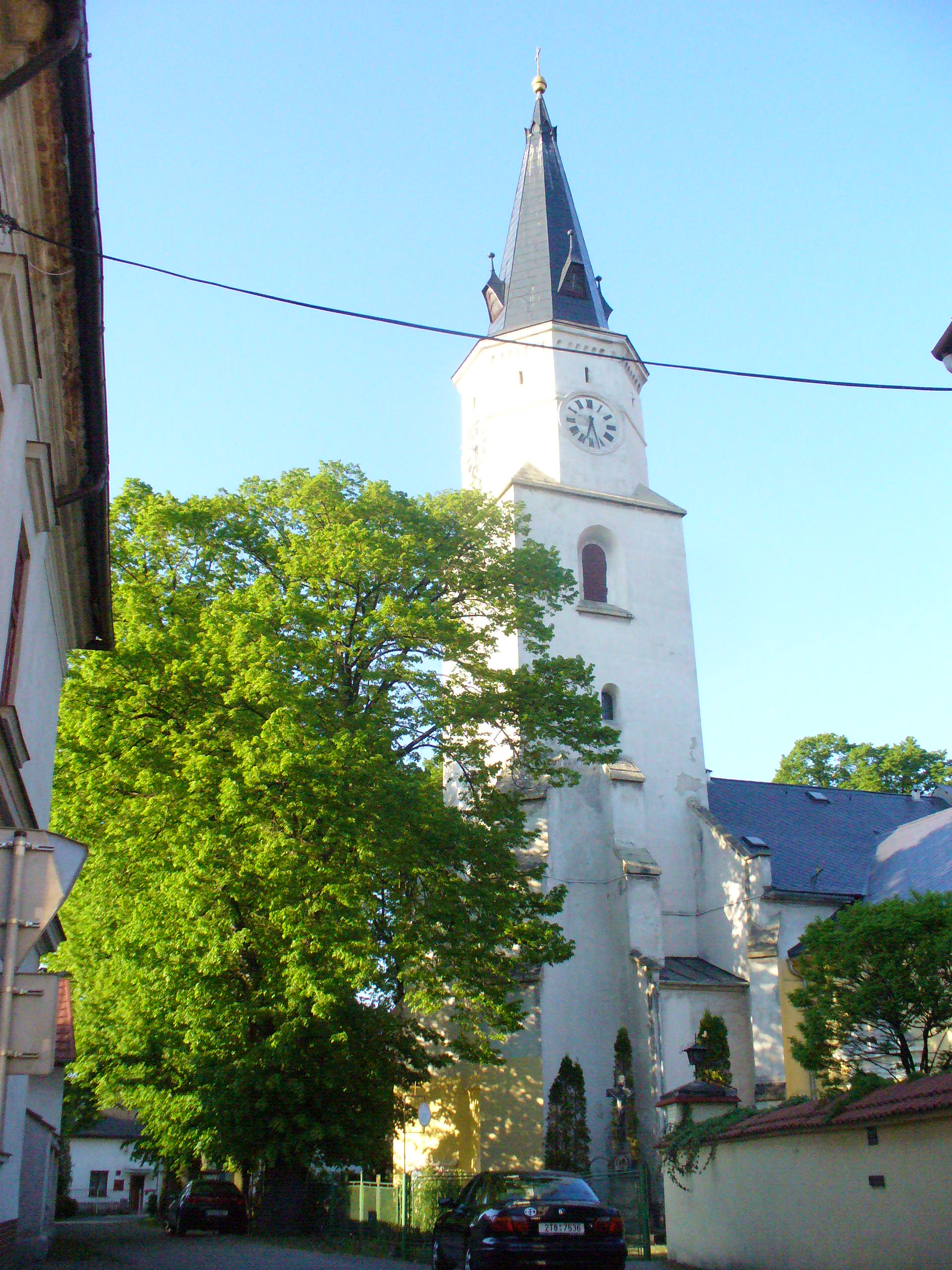 w Starym Bohuminie